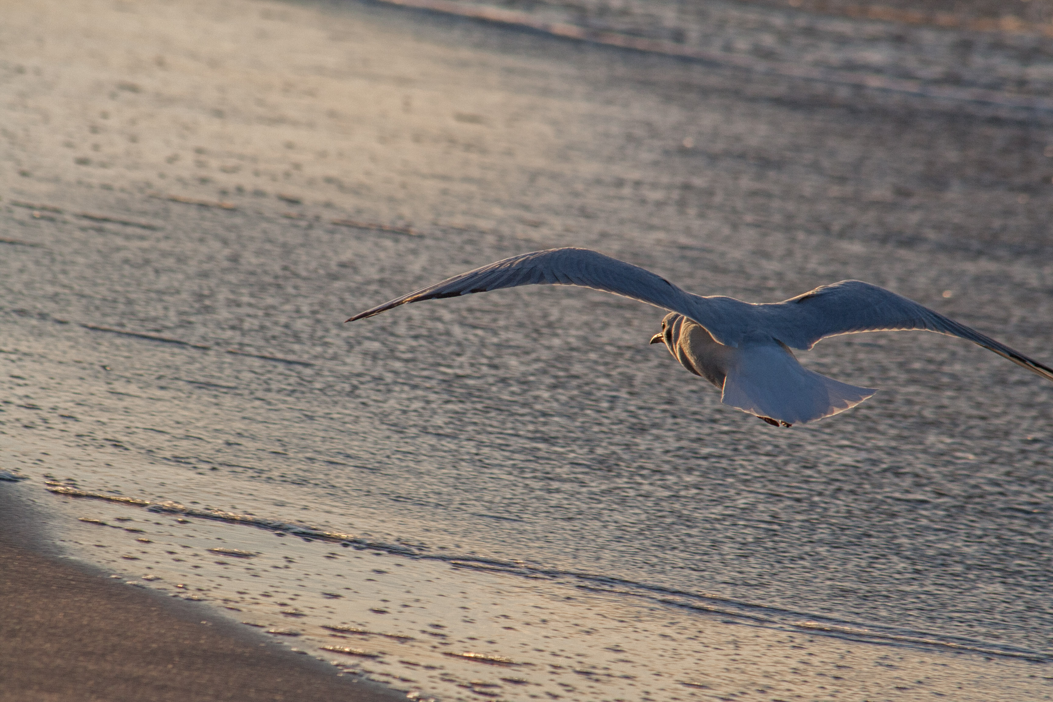 Möwe am Strand, Naturschutzgebiet Nordwestufer Wittow und Kreptitzer Heide, FFH-Gebiet Steilküste und Blockgründe Wittow, Vogelschutzgebiet Plantagenetgrund, Dranske